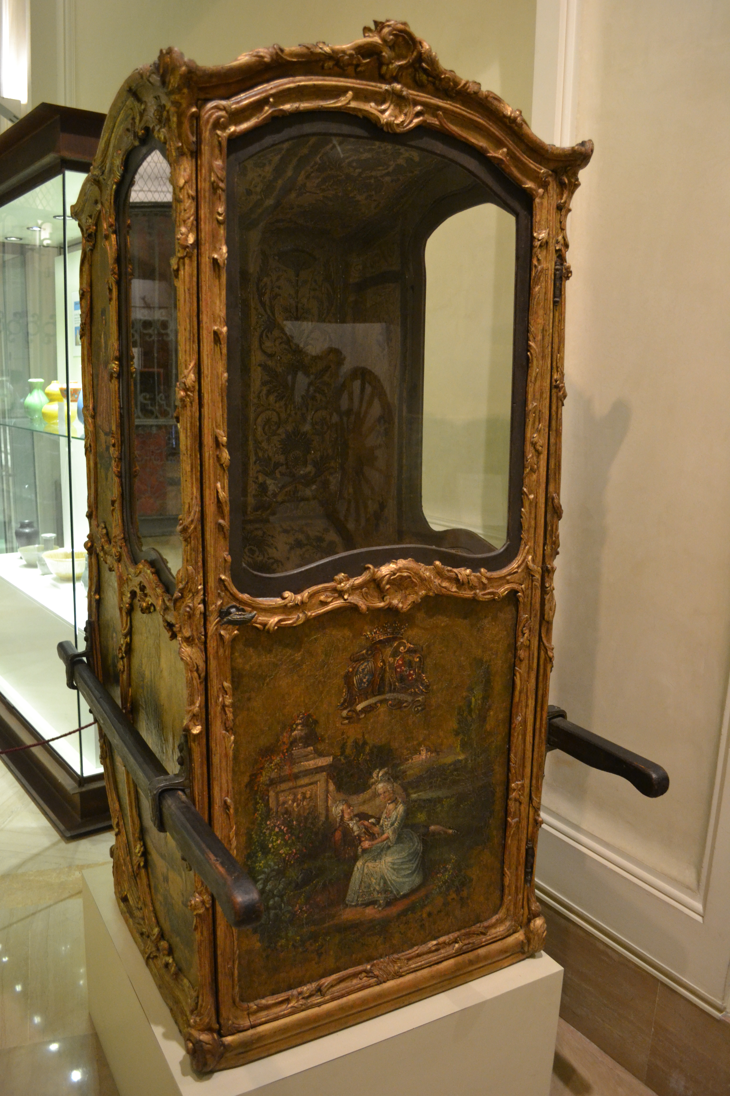 Cadira de mà espanyola, de fusta dauradab en la seva part visible i revestida de cuir repussat i policromat -guadamassil-. En la portelleta, la qual compren tot el plafó deventer, porta un escot de filiació desconeguda. L'interior va folrat de ras blanc brocat d'argent. Segle XVIII. Sala de carruatges del Palau del Marqués de Dosaigües.